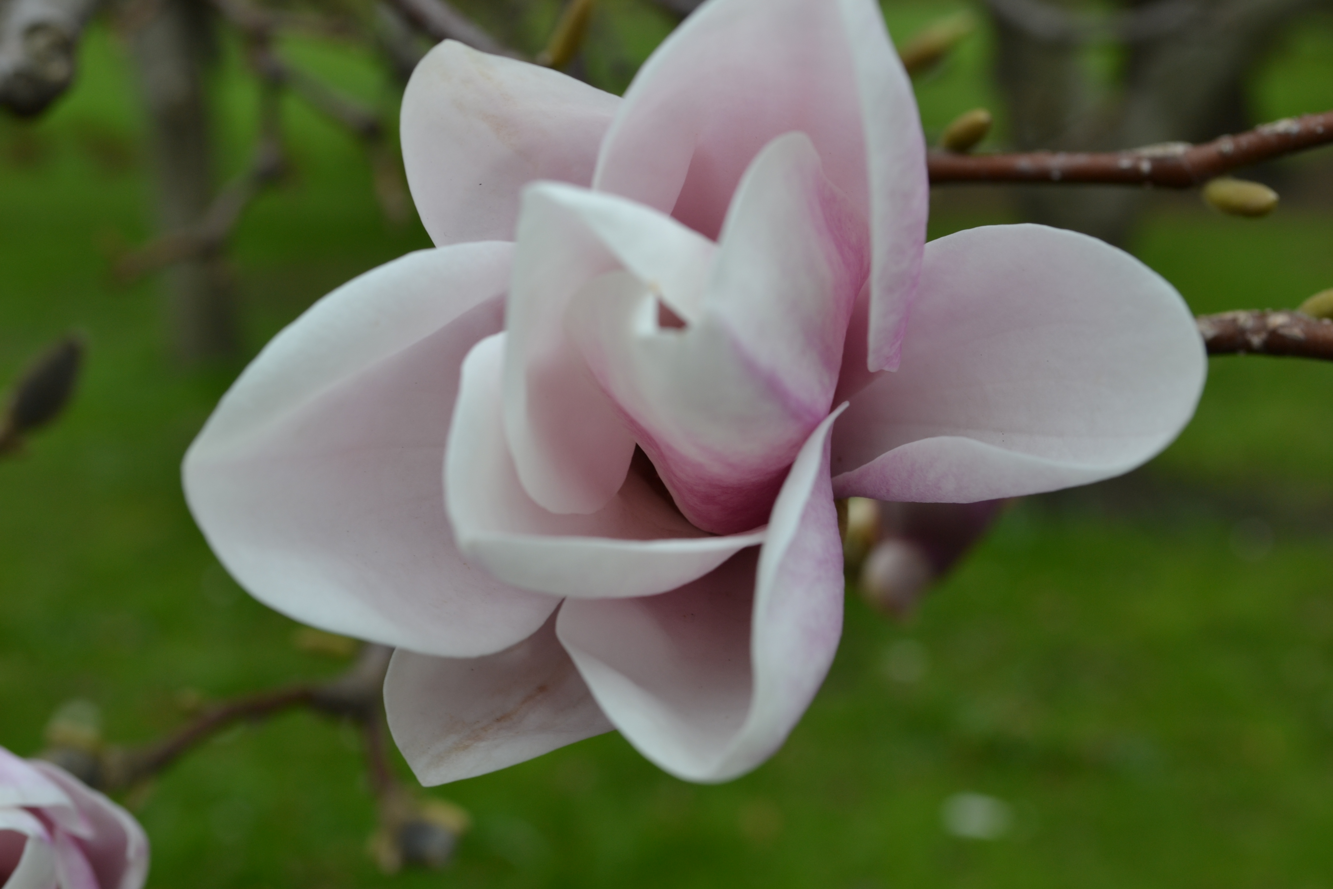 Magnoila fotograferad i centrala Prag, Tjeckien.